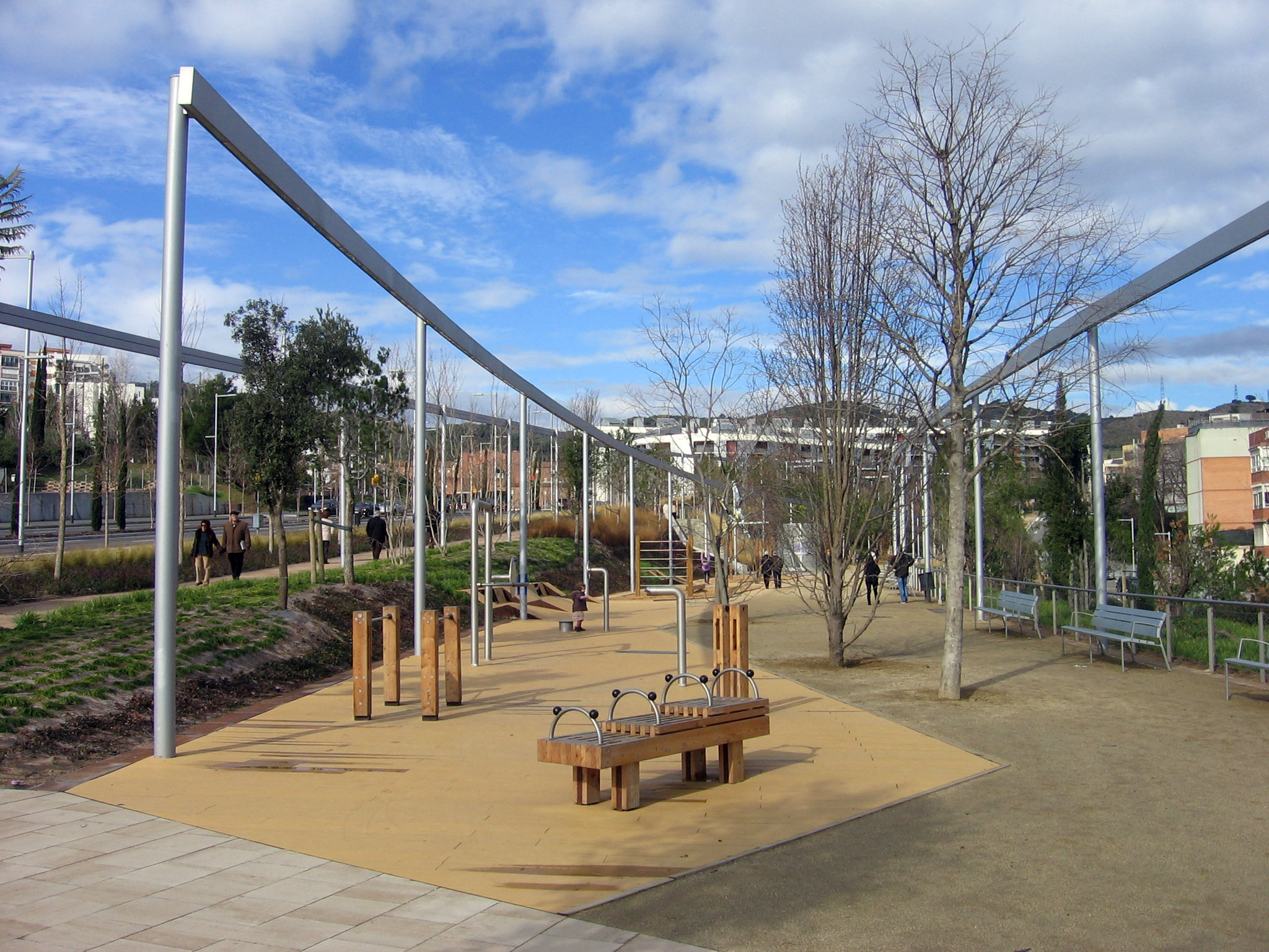 Parque de les Rieres d'Horta.